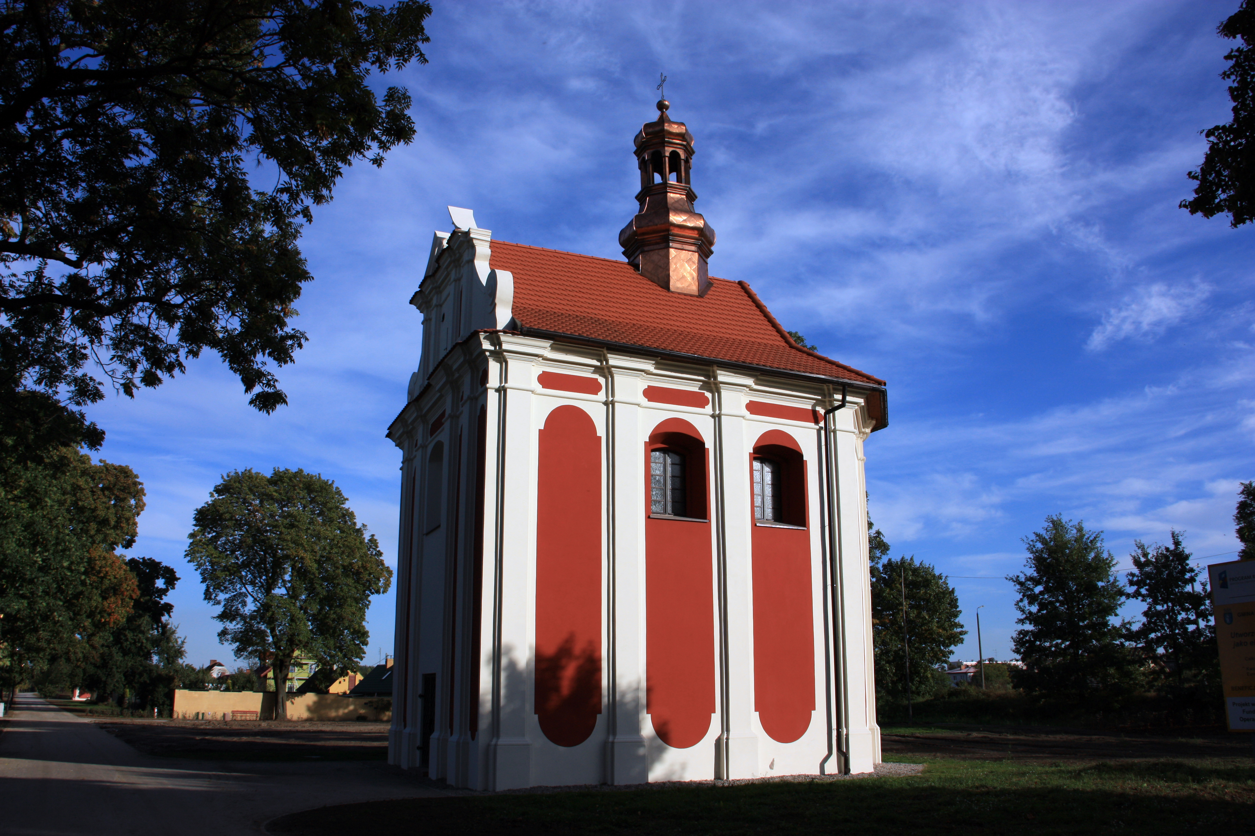 zespół kalwarii, XVII-XIX w.: 25 kaplic; tzw. klasztorek (plebania) Pakość Kapliczka: Wieczernik